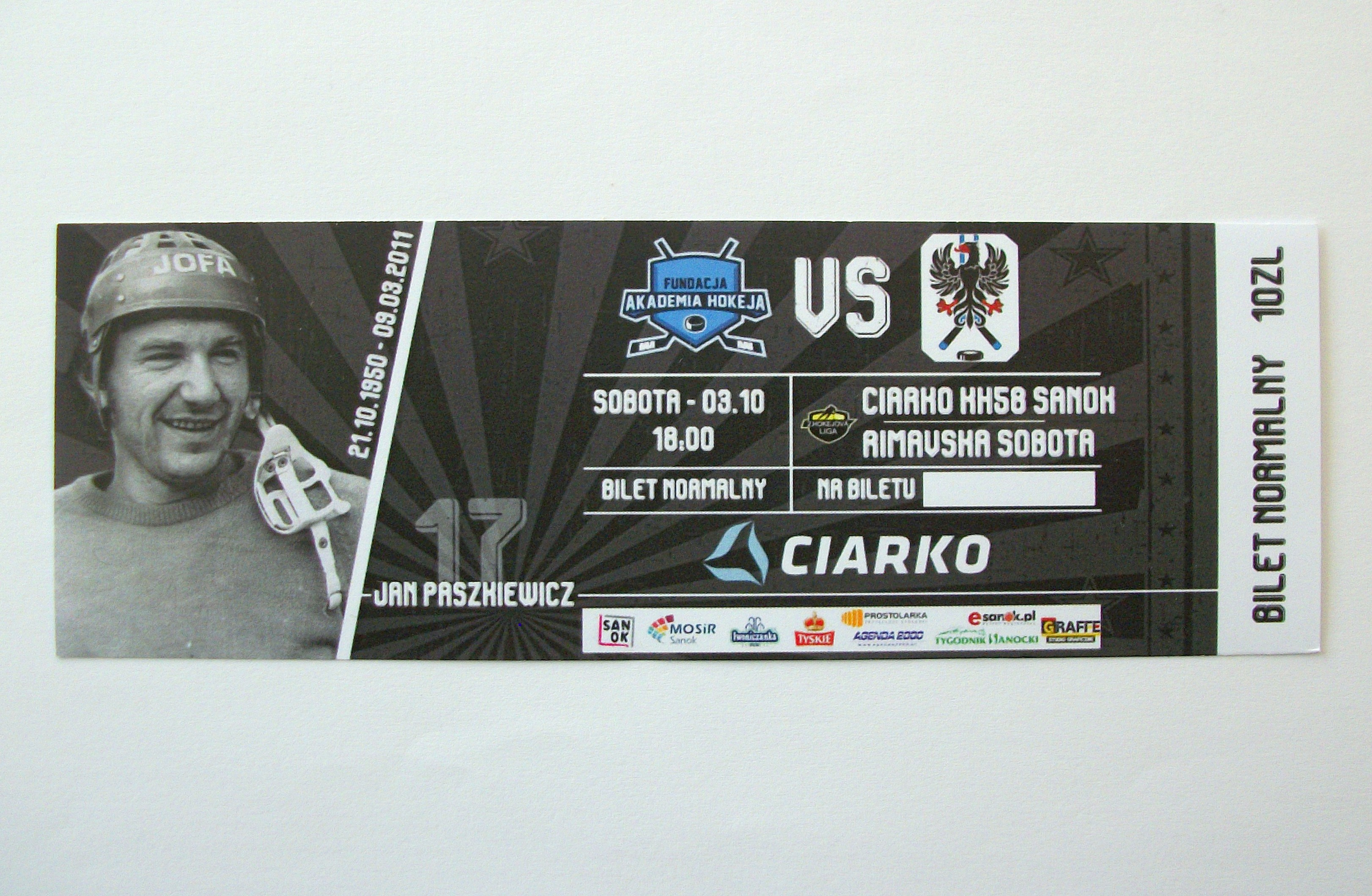 Bilet wstępu na mecz 2. ligi słowackiej: Ciarko KH 58 Sanok vs. HKM Rimavská Sobota (2018-11-03). Na bilecie uhonorowany hokeista Jan Paszkiewicz (1950-2011).